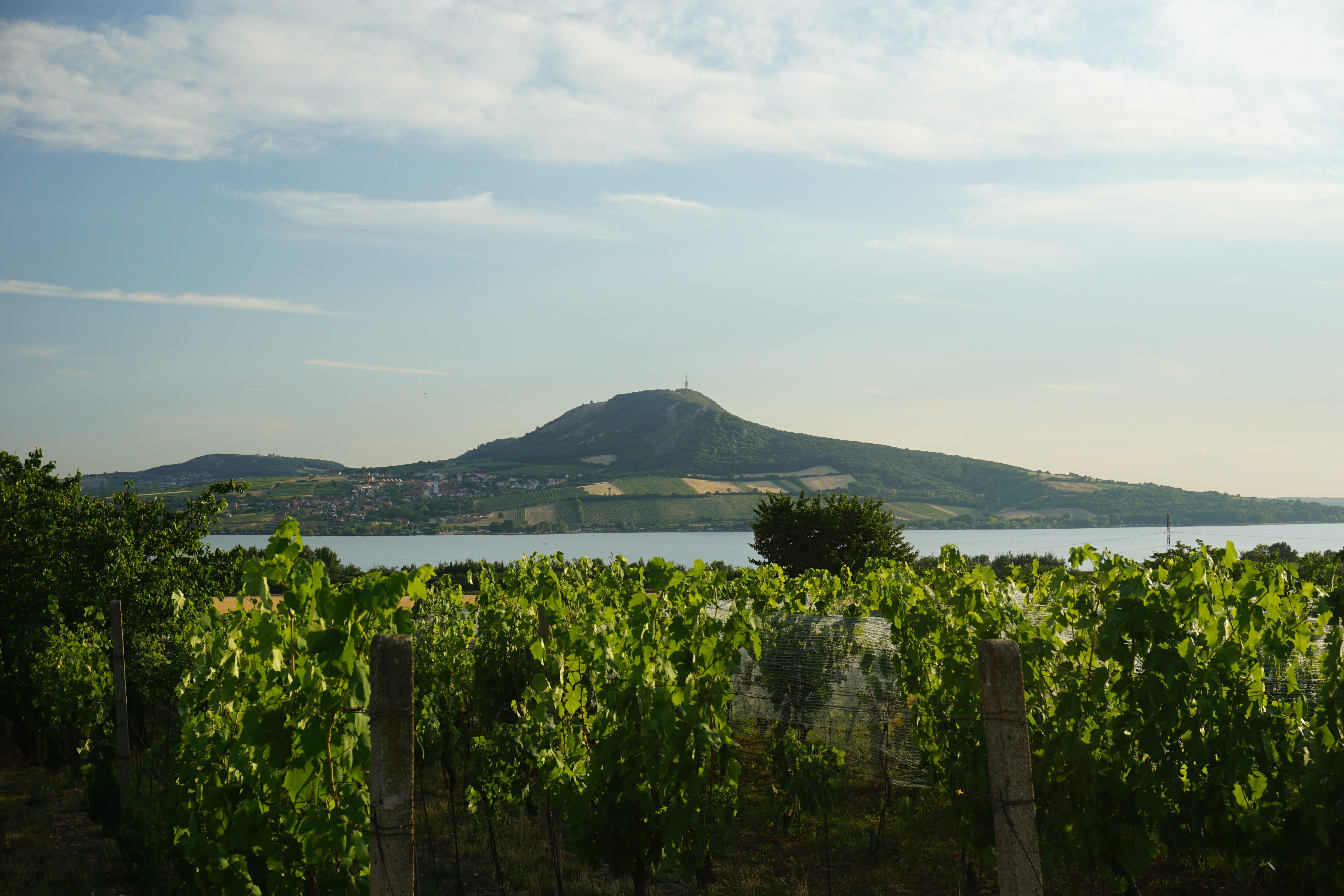 Pálava. Hinter den Weinbergen befindet sich der Thaya bei Unter Wisternitz. Aufgenommen in Schakwitz